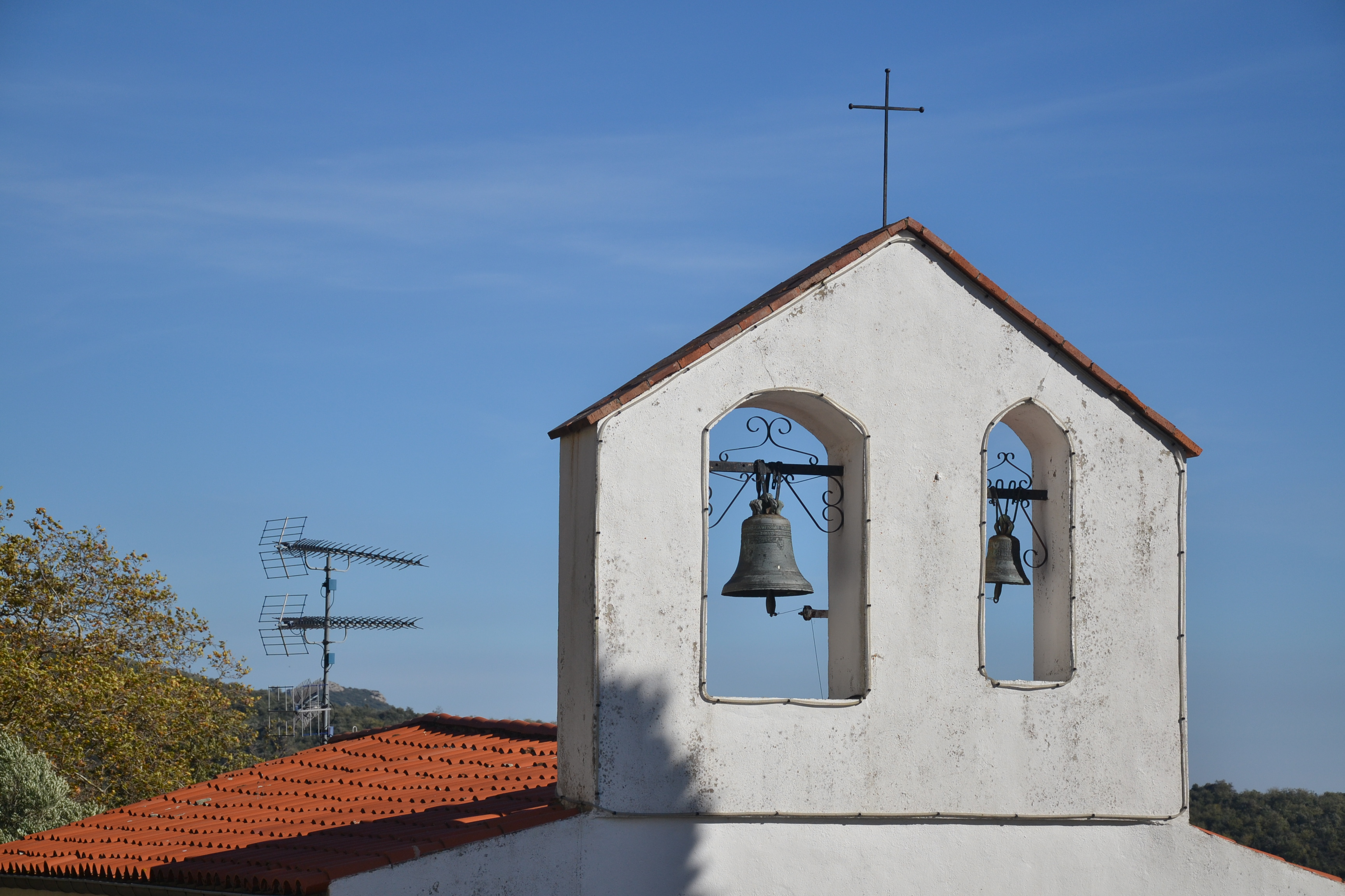 Église Saint-Assiscle et Sainte-Victoire, dans le bourg de Fosse (Pyrénées-Orientales, France).